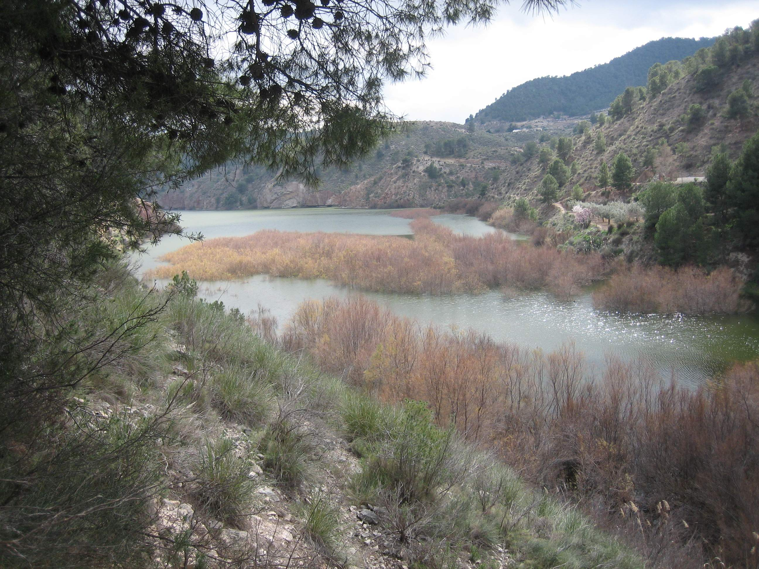 Vista de la cola del pantano de Tibi, donde se recogen las aguas del Río Verde (Alicante, España). Foto realizada por Rodriguillo el 24/02/2005.